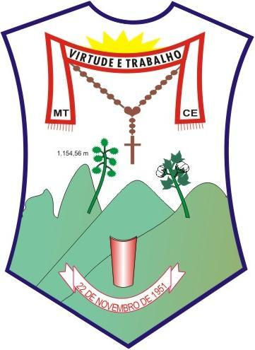 Brasão do Município de Monsenhor Tabosa